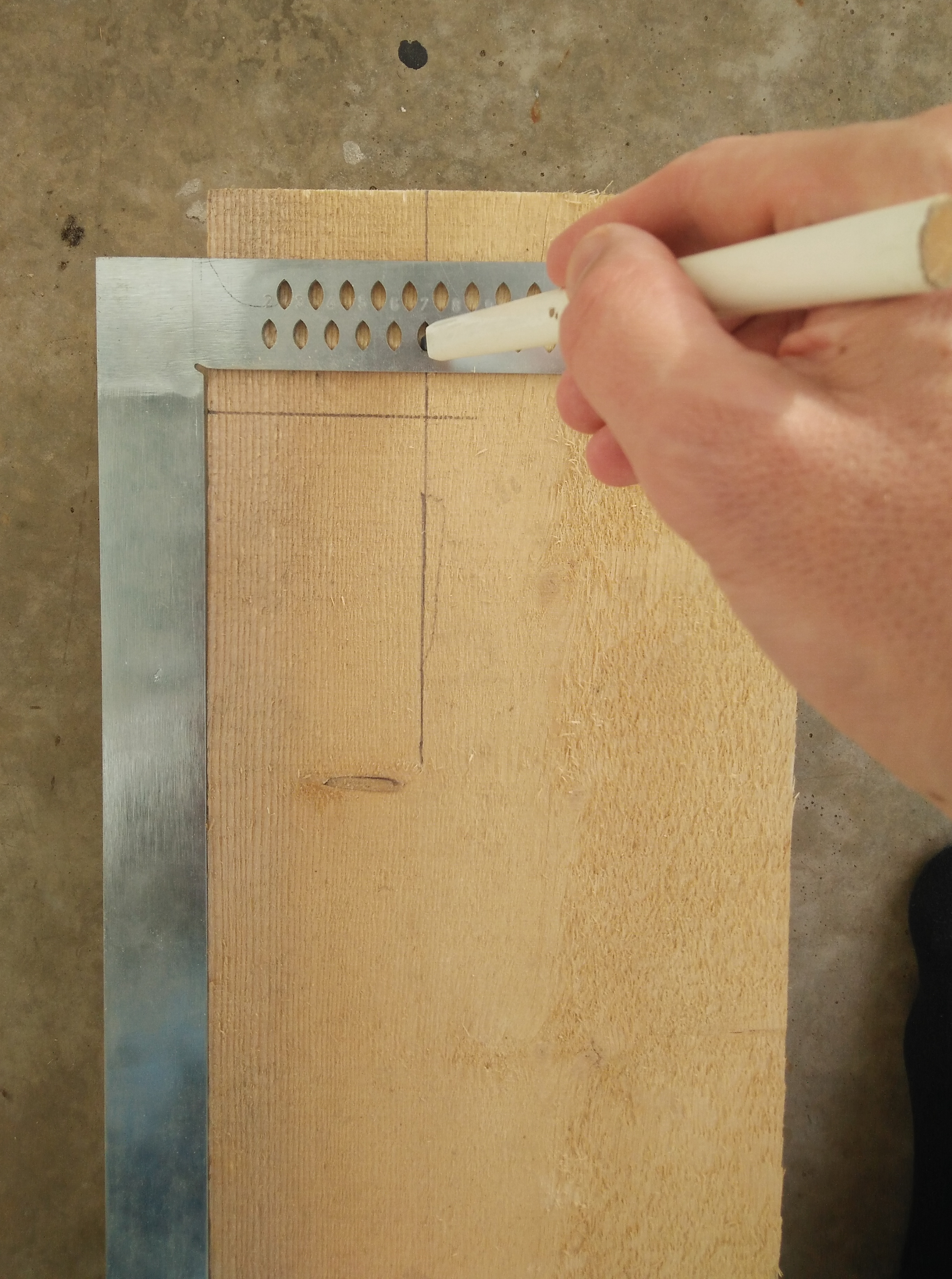 Zimmermannswinkel Anriss mit Bleistift